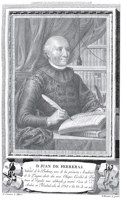 Retrato de Juan de Ferreras